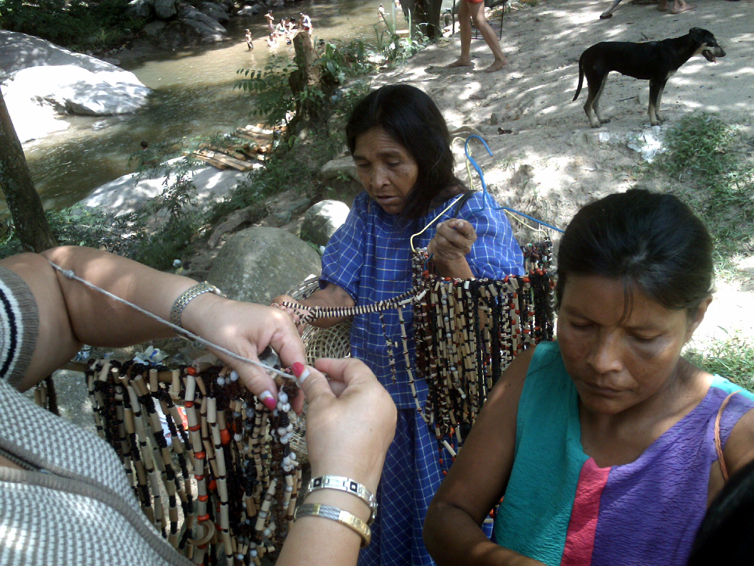 Mujer vendiendo artesanía con su hija en un río en las cercanías de la Sierra de Perija